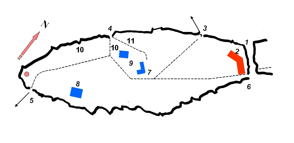 Plan schématique du Camp celtique de la Bure (Saint-Dié-des-Vosges), réalisé d'après la signalétique présente à l'entrée du site. 1. Fossé 2. Remparts 3. Porterne Nord 4. Porte Nord 5. Poterne Ouest 6. Poterne Est 7. Bassin de Taranis 8. Bassin des Dianes 9. Station de lavage du minerai de fer 10. Atelier de cinglage 11. Chemin minier Flèche : vers une source Cercle : Table d'orientation